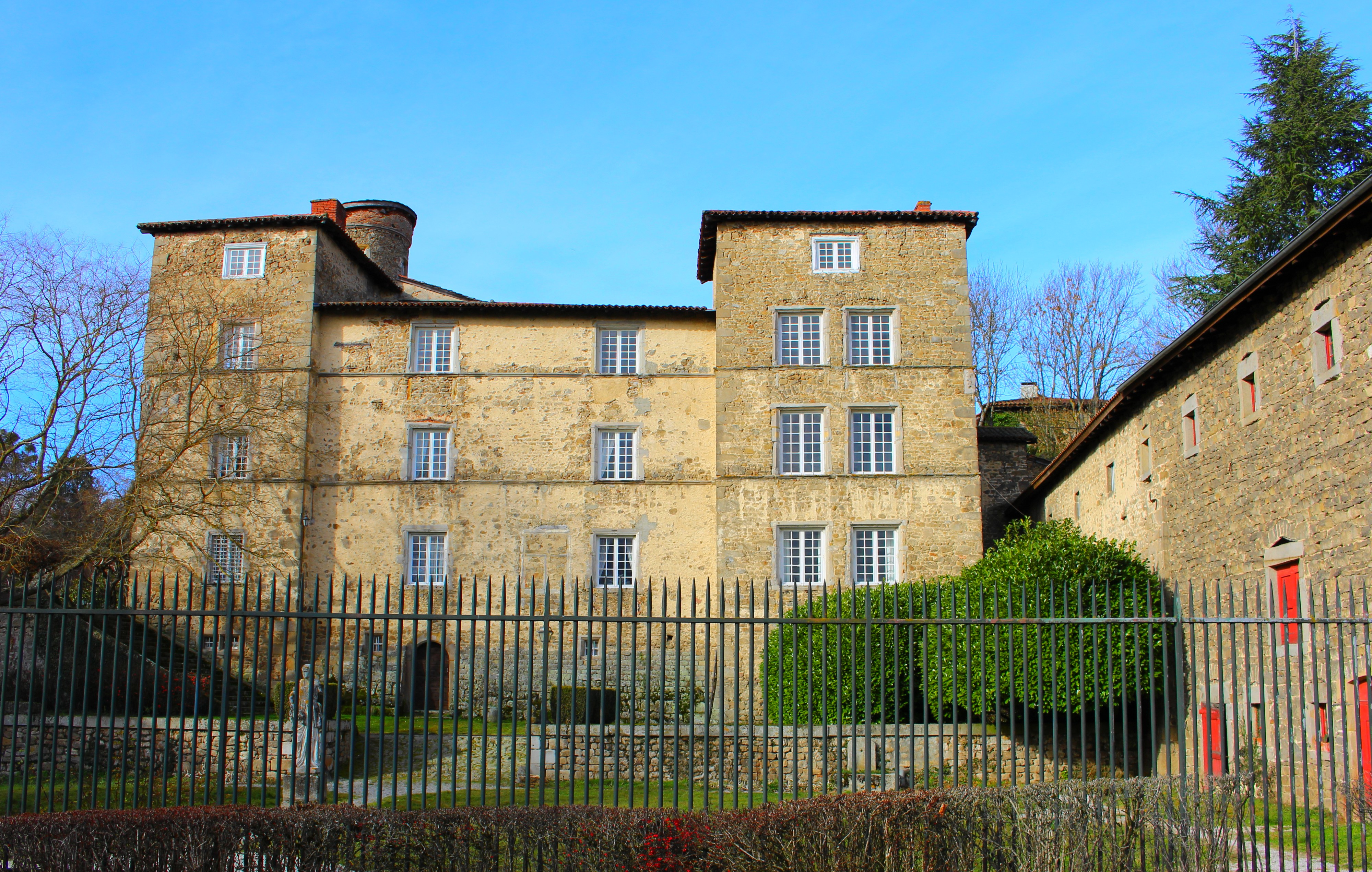 Le château de Malval, situé à Saint-Héand. Inscrit à l’inventaire des Monuments Historiques (arrêté du 8 mai 1964).